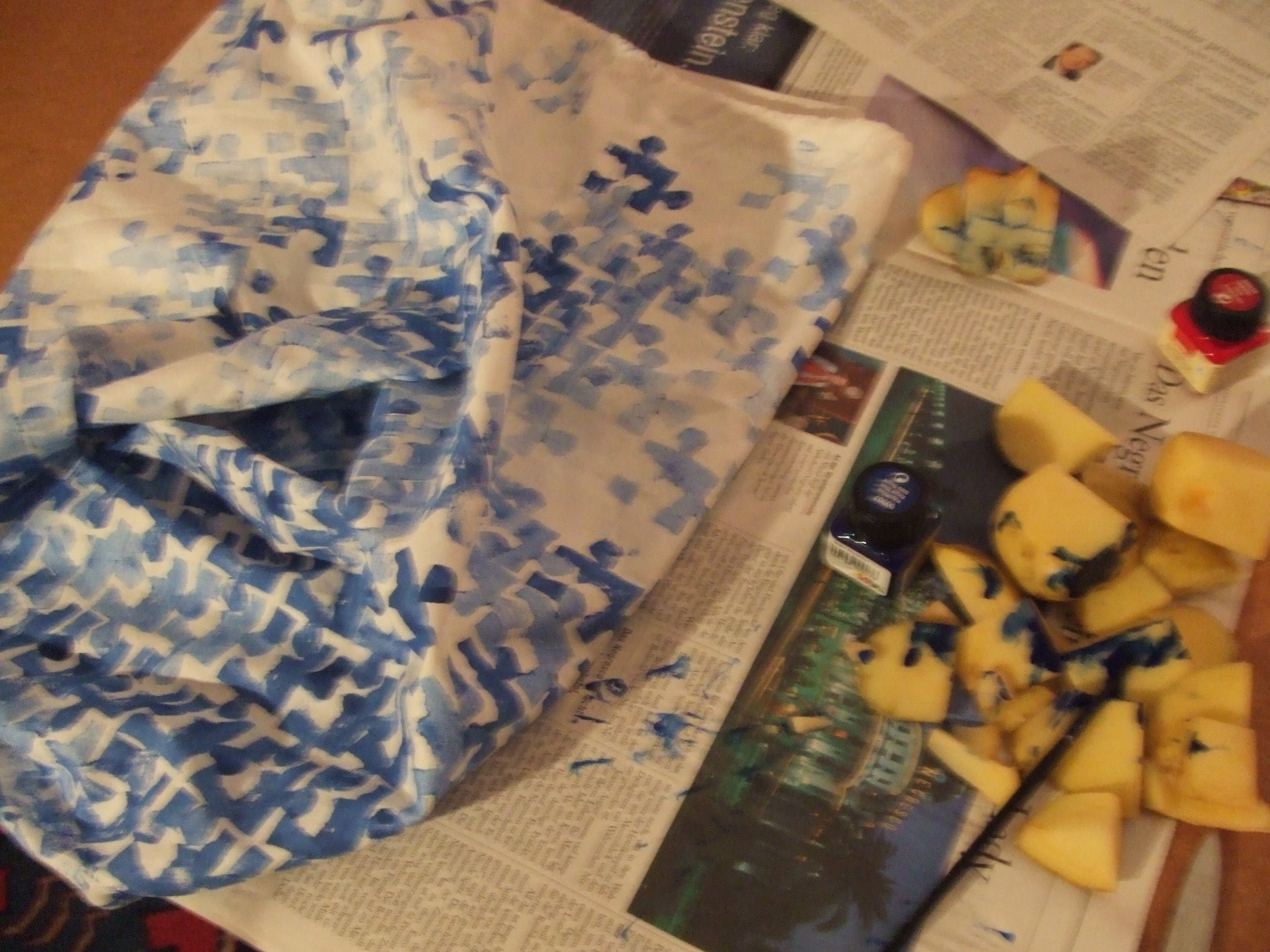 Von Poupou mit Kartoffeln bedruckter Kubbbeutel (während des Druckes)